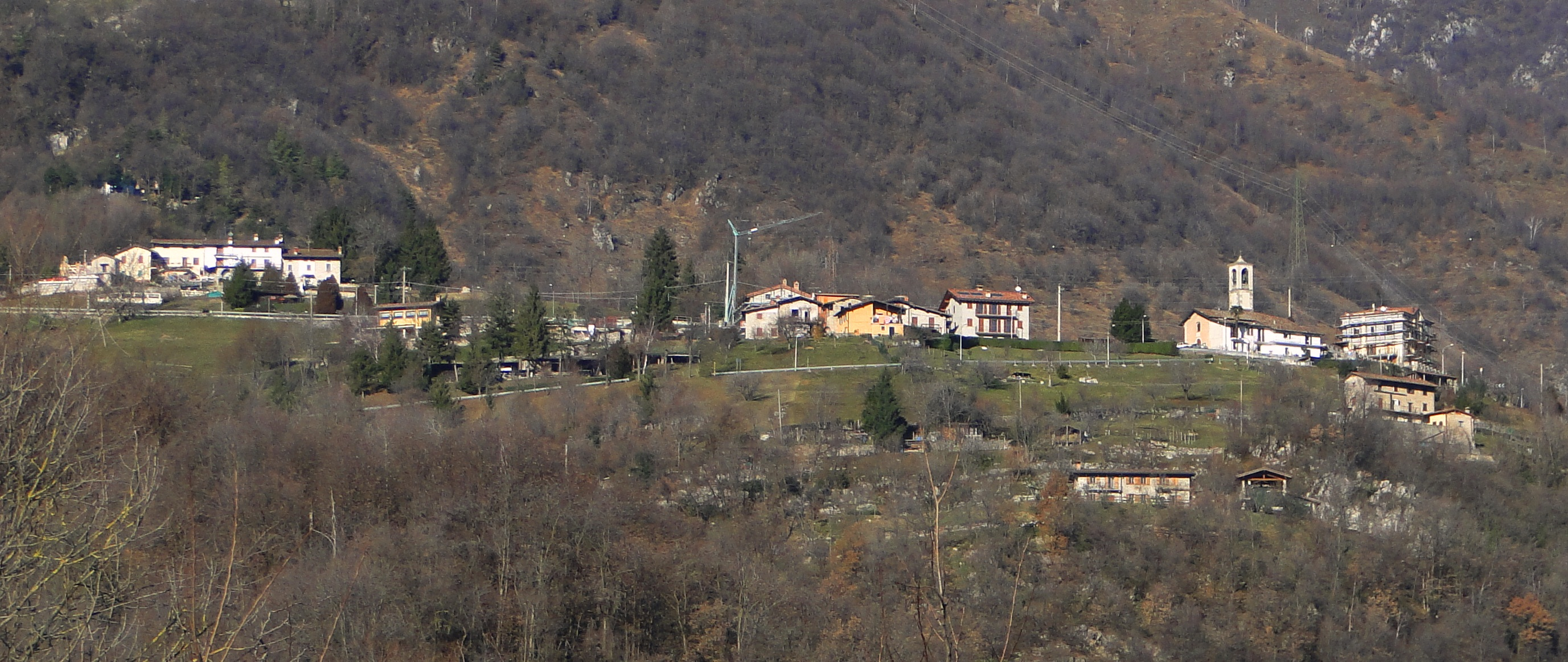 Panorama di Burro, fraz. di Alzano Lombardo (BG), Italy.